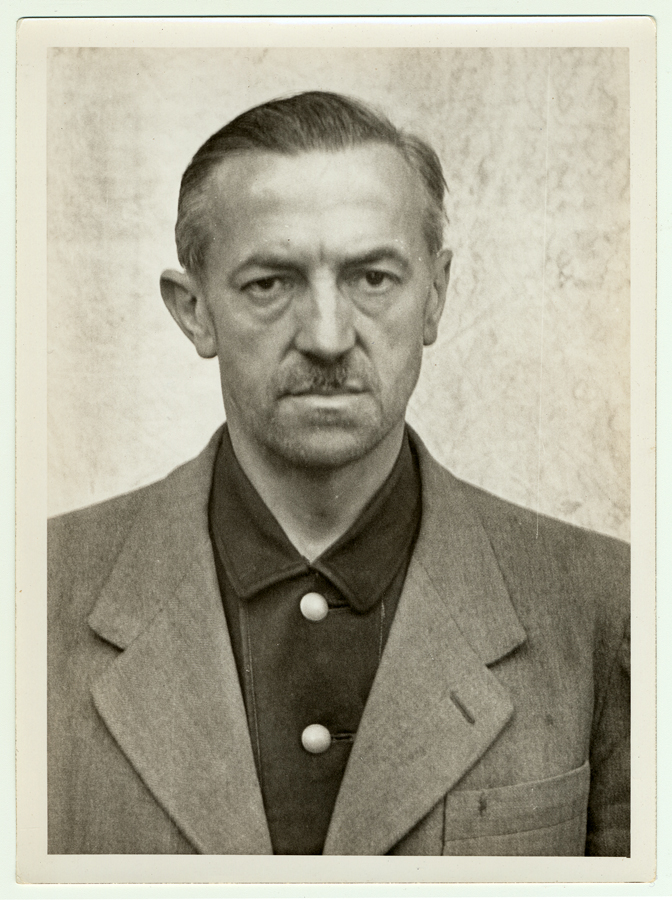 Johann Georg Kick (* 24. November 1901 in Waldau; † 29. Mai 1946 in Landsberg am Lech) war SS-Obersturmführer und als Kriminalkommissar Leiter der Politischen Abteilung im KZ Dachau. Im Dachau-Hauptprozess wurde Kick zum Tode verurteilt und hingerichtet.